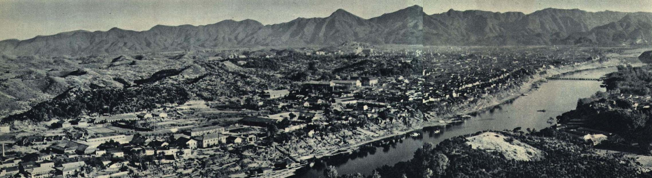 1962-03 1962年 景德镇